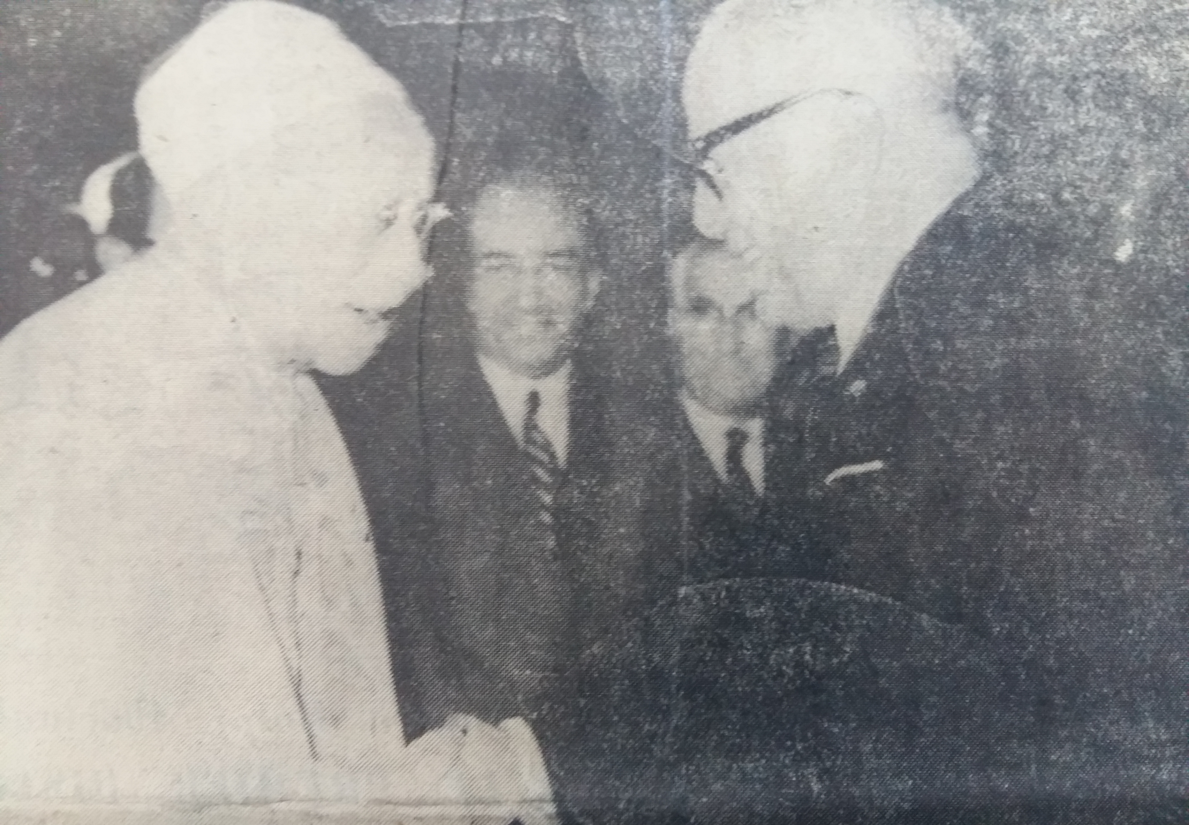 Habib Bourgiba félicite Tahar Ben Achour en tant que lauréat du Prix Bourguiba de littérature